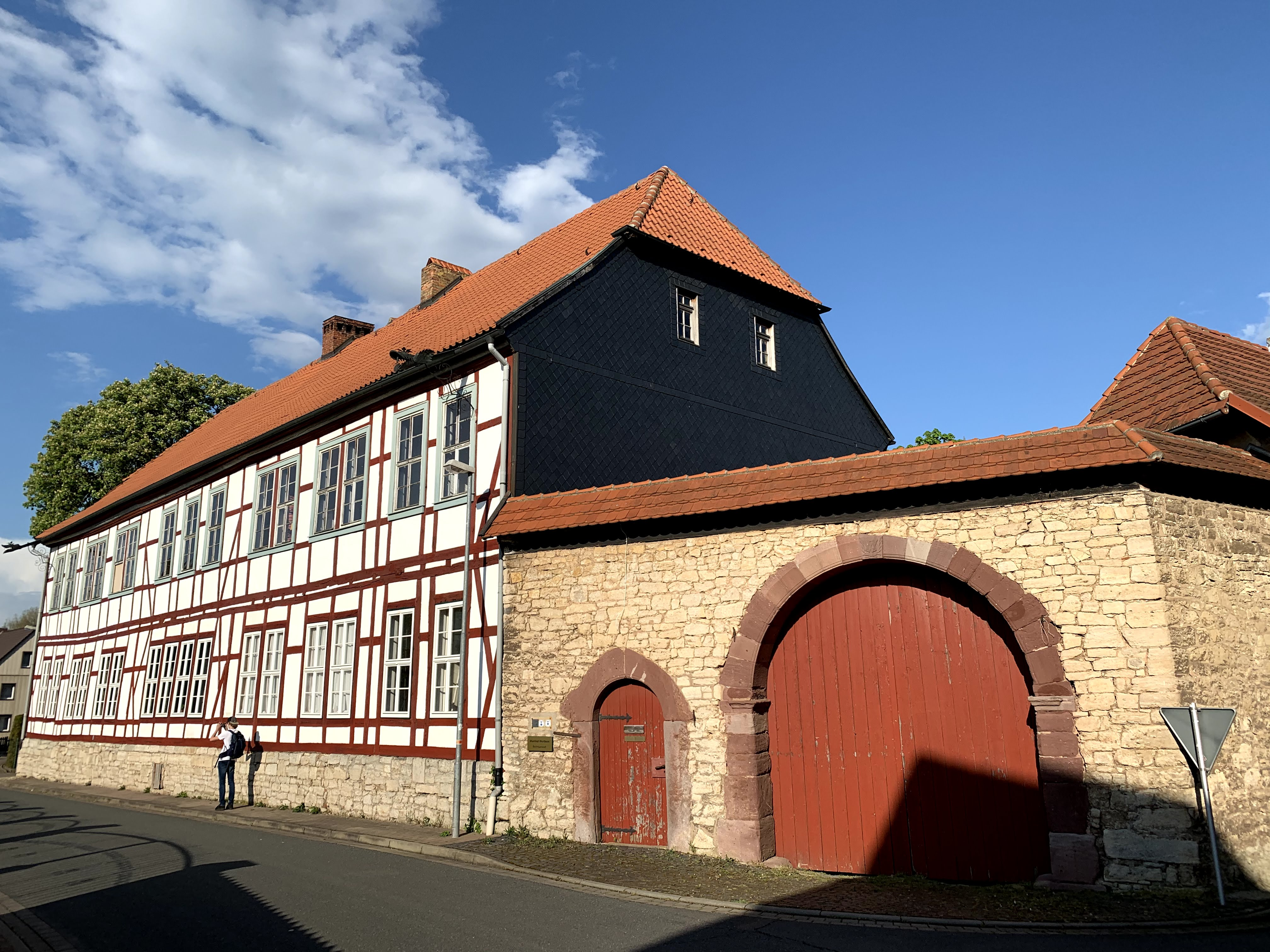 Ansicht des Schloss Hue de Grais in Wolkramshausen Blick aus Süden auf die Straßenfront